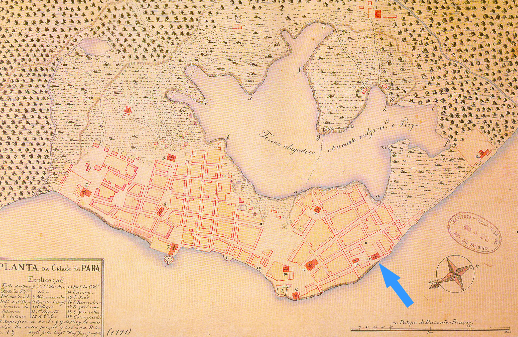 Destaque para a Igreja do Carmo na Planta da Cidade do Pará, de Gronsfeld, ca. 1771 This file was derived from: Planta da cidade do Pará.jpg